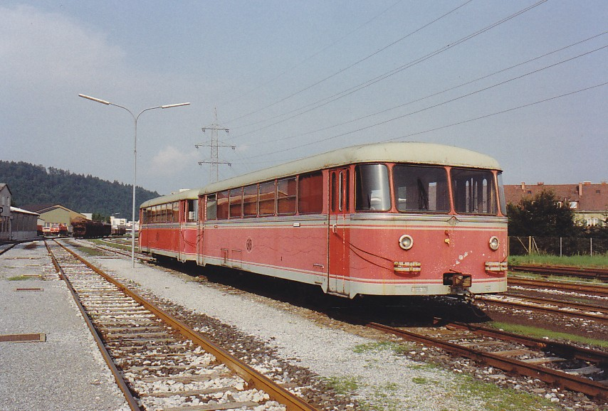 Schienenbusgarnitur der GKB im Mai 1989